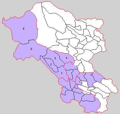 宮城県玉造郡の町村。